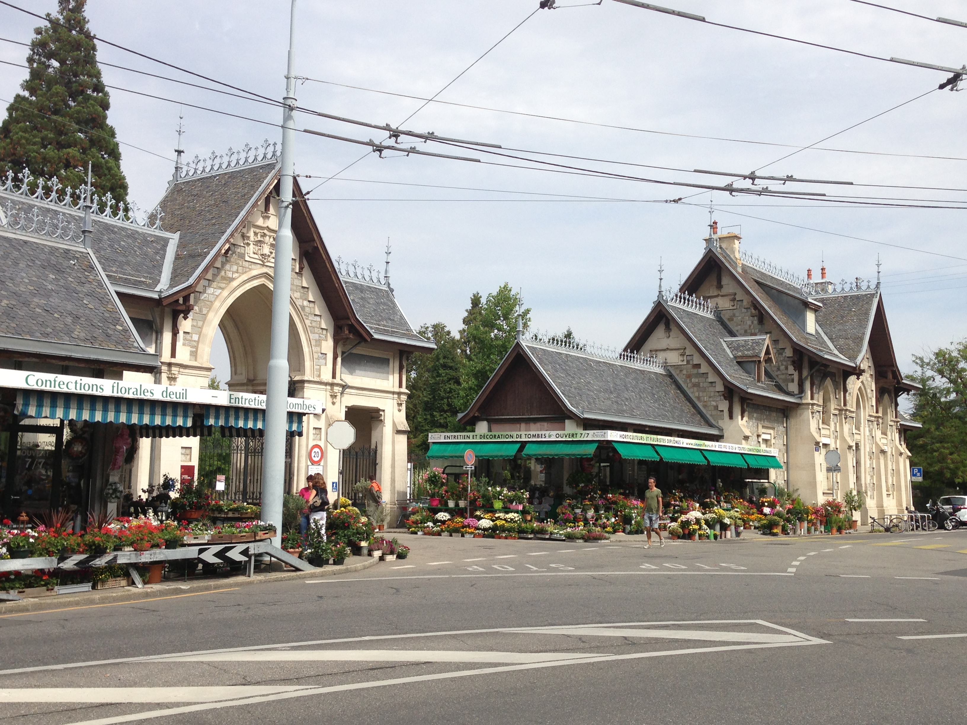 Entrée néo-gothique du cimetière Saint-Georges de Genève, réalisée par John Camoletti (1848-1894)